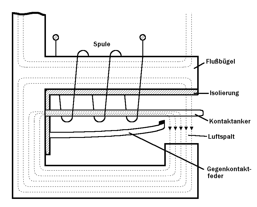 Schematischer Aufbau eines ESK-Relais mit Magnetfeldlinien zum Zeitpunkt des Einschaltens (Kontakt noch in Ruhestellung)